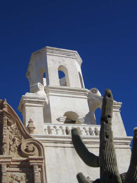 Mission San Xavier del Bac (photo personnel 2005)